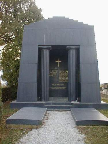 Mauzolej obitelji Des Piennes na groblju u Vrbovcu